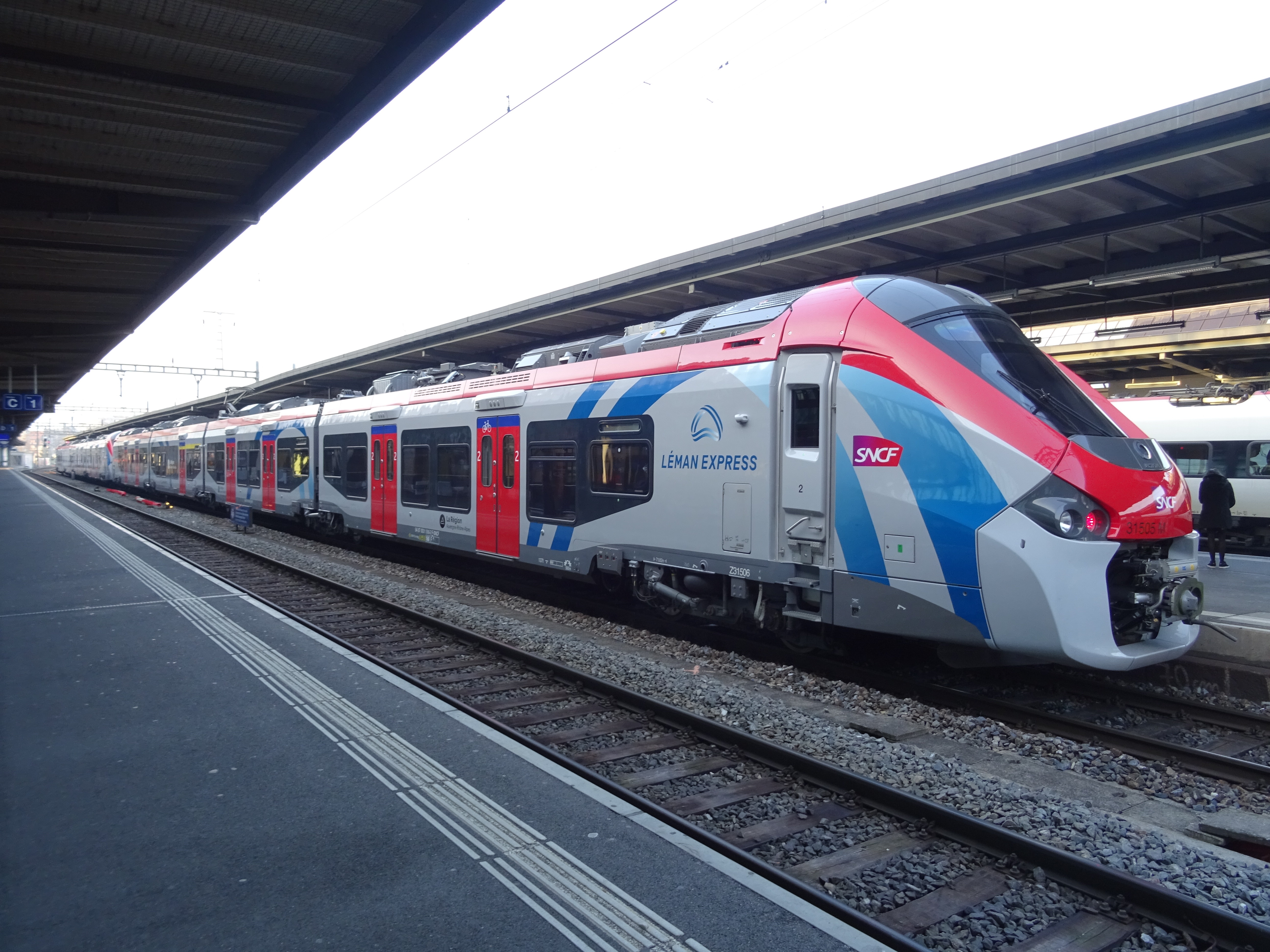 Z 31500 à quai en gare de Genève-Cornavin, voie 2.